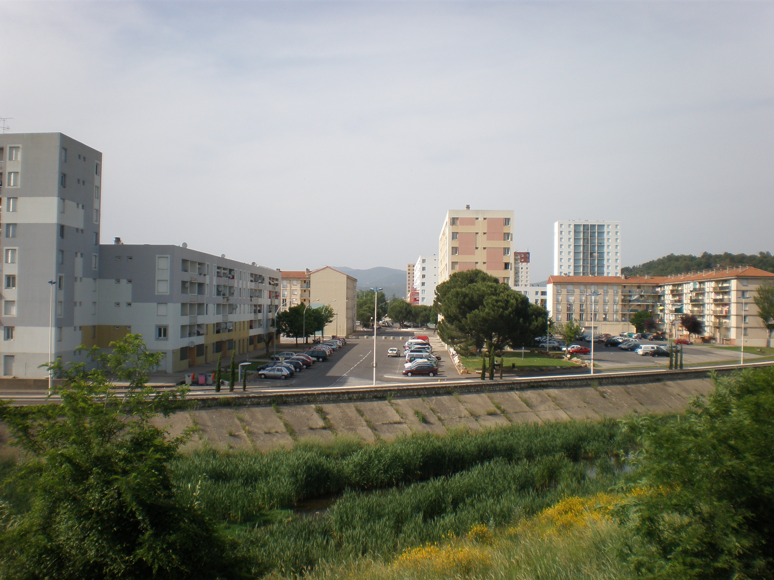 Le quartier des Cevennes à Alès (Gard), grands ensembles de logements construits dans les années 1960